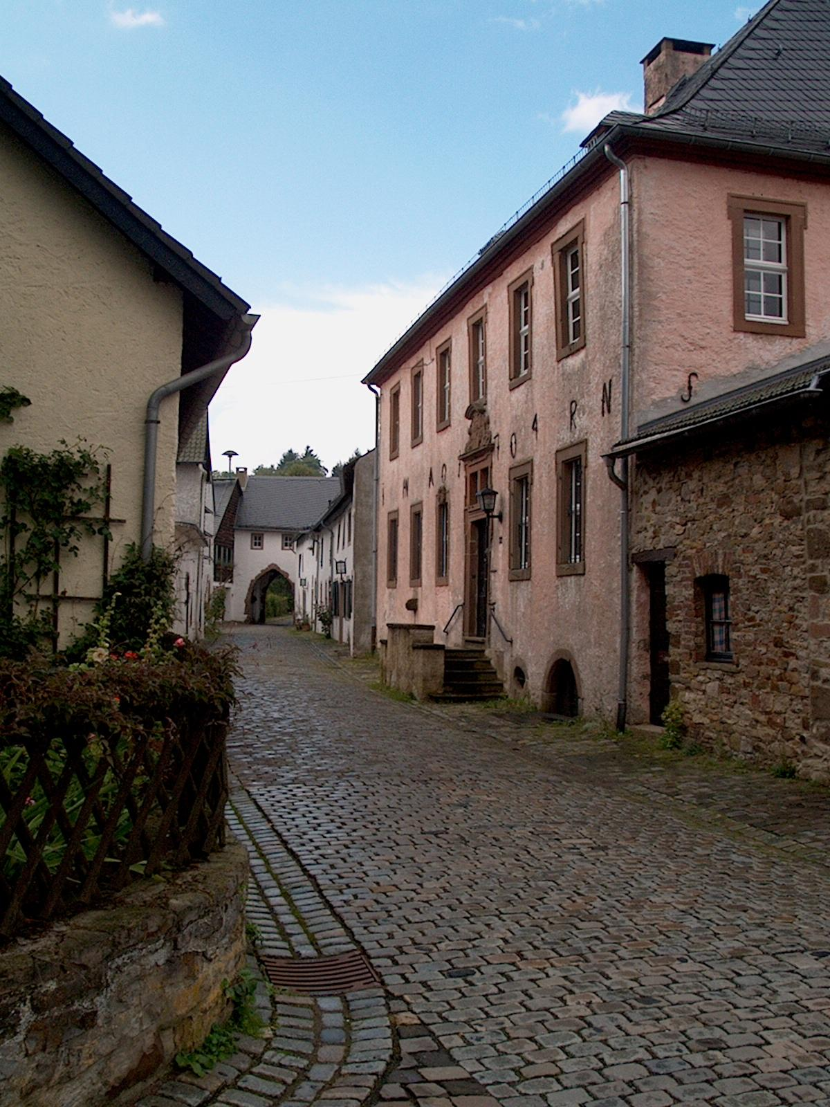 Ortsansicht Kronenburg, Kreis Euskirchen, rechts Pallandthaus von 1704